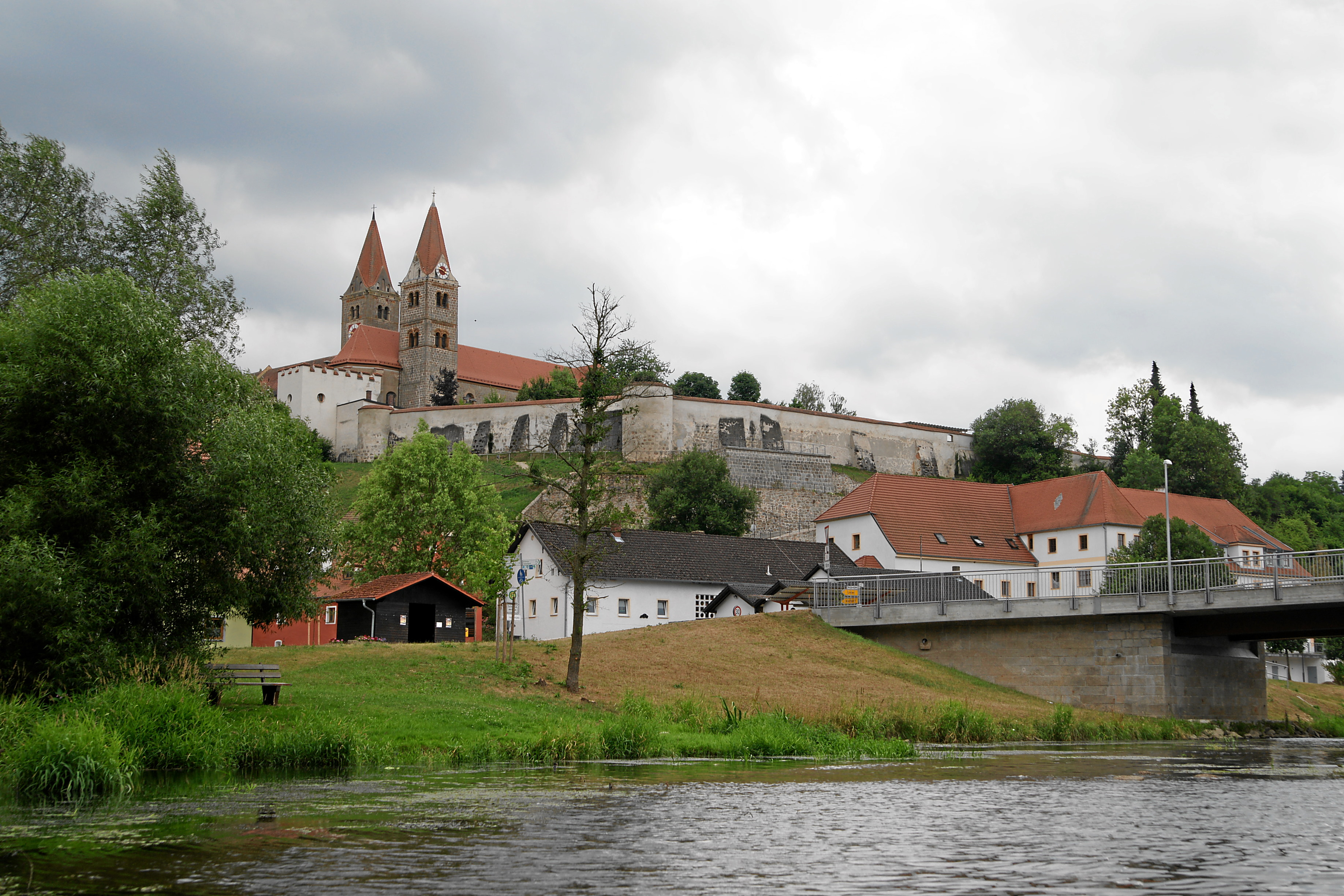 Kirche Reichenbach am Regen